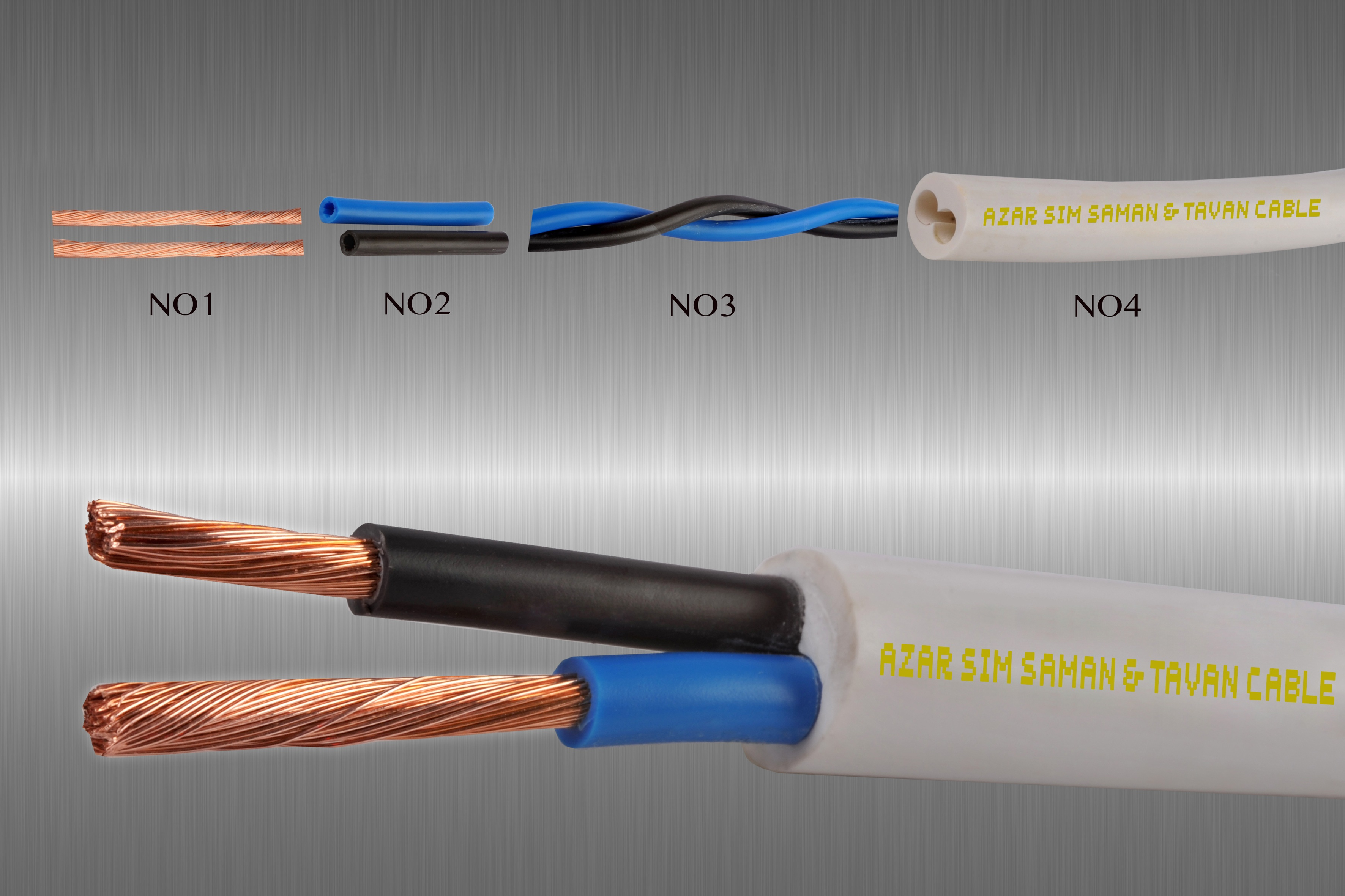 كابل سفيد دو رشته